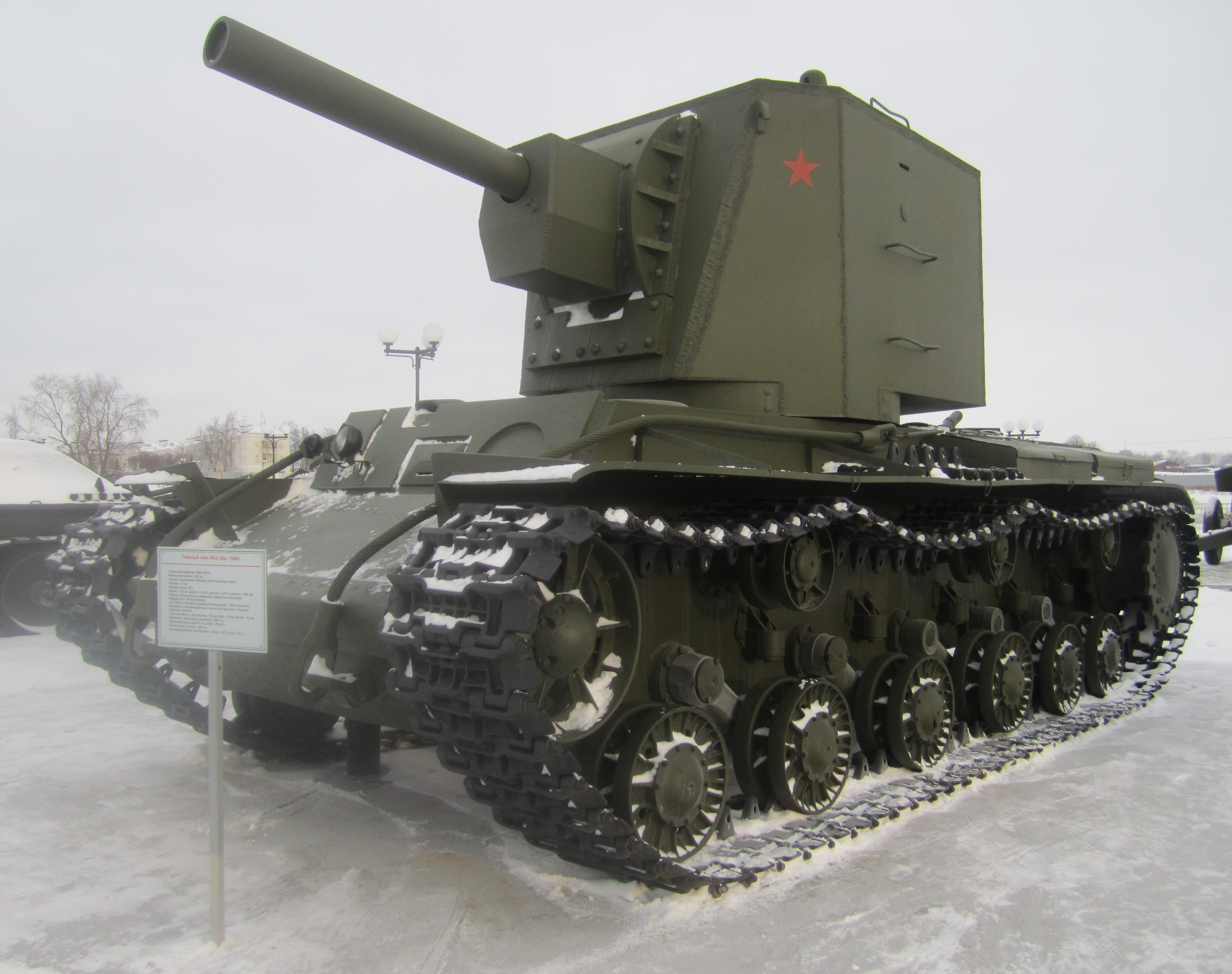 Танк КВ-2 в музее Верхней Пышмы